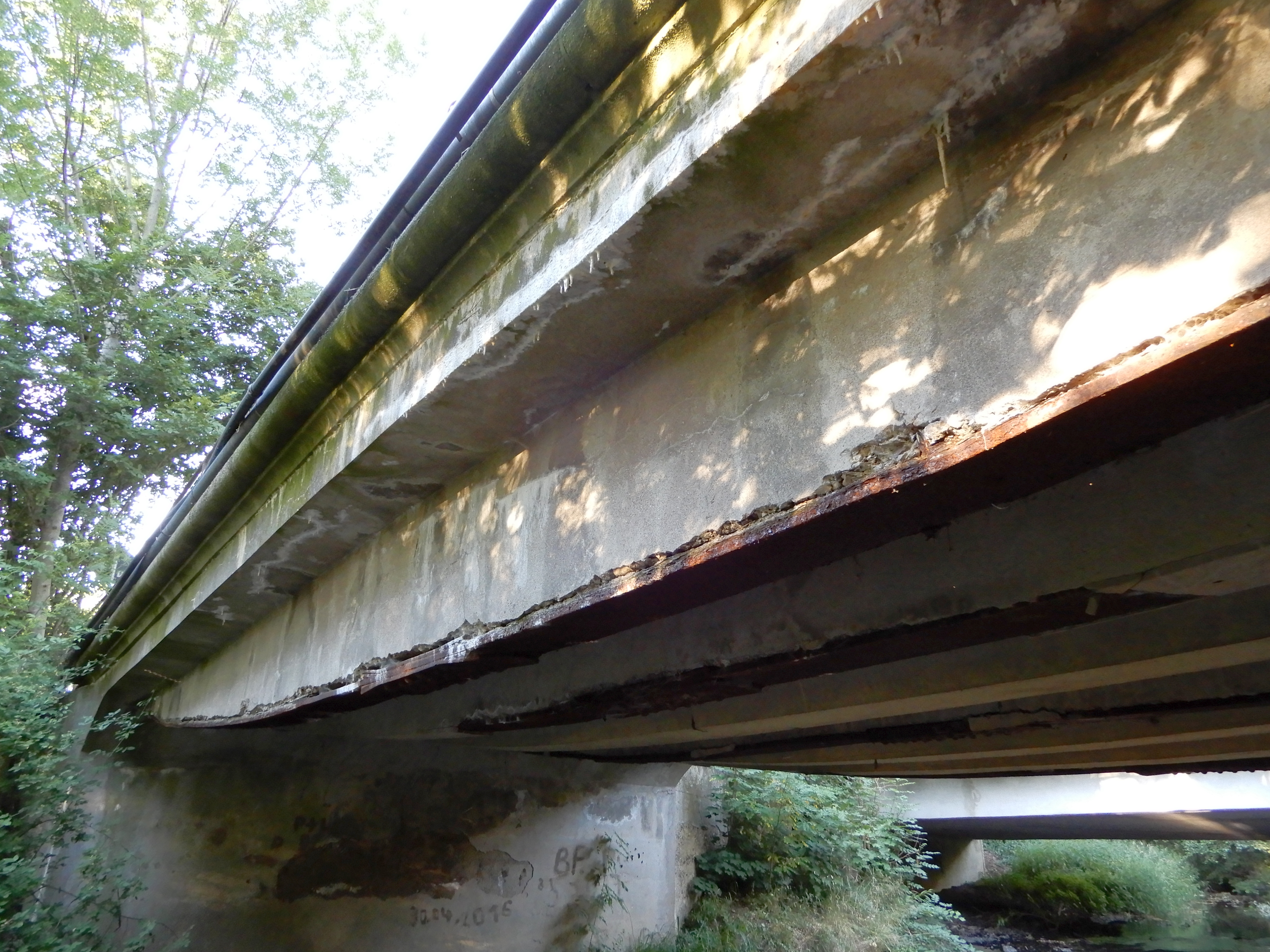 Hängegurtträger (genannt Möllerbrücke) nach Max Müller über die Selke